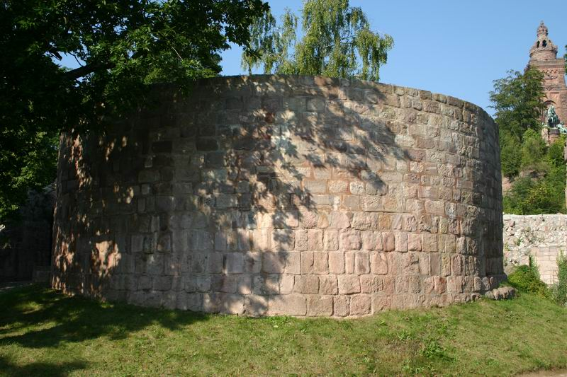 Burg Kyffhausen - Stumpf des Bergfriedes der Unterburg